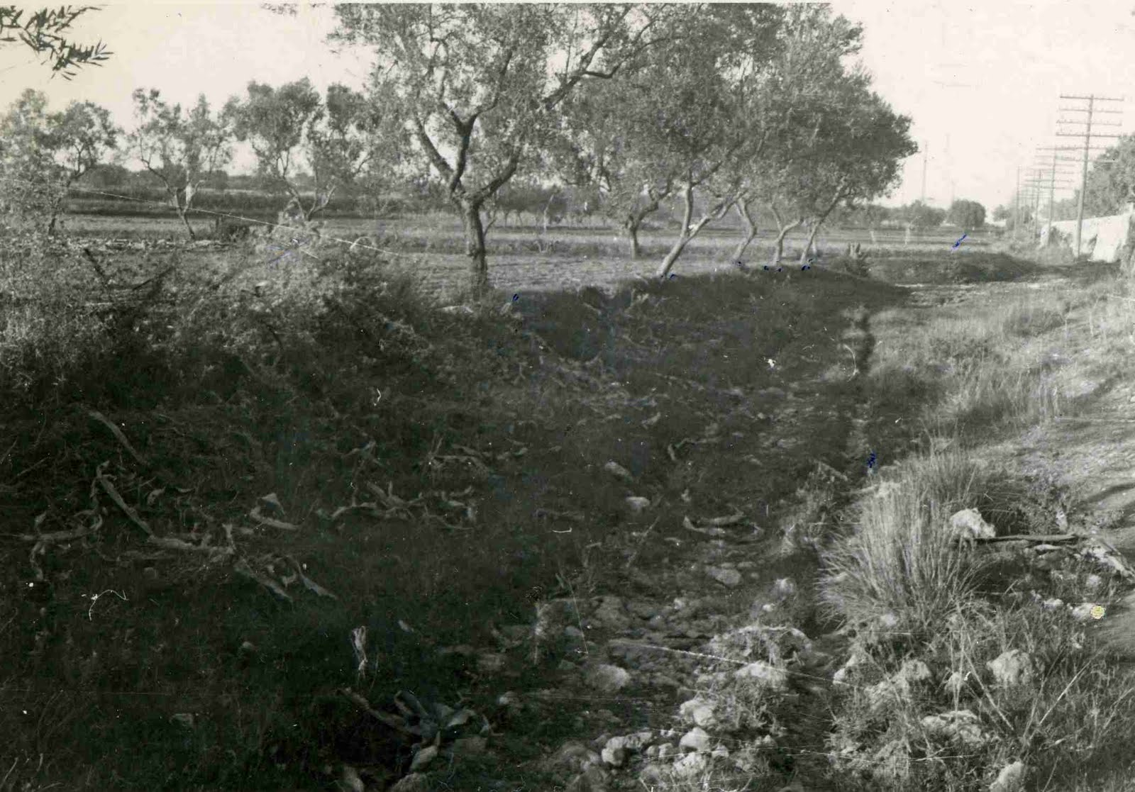 Lugar del fusilamiento del Beato en Silla